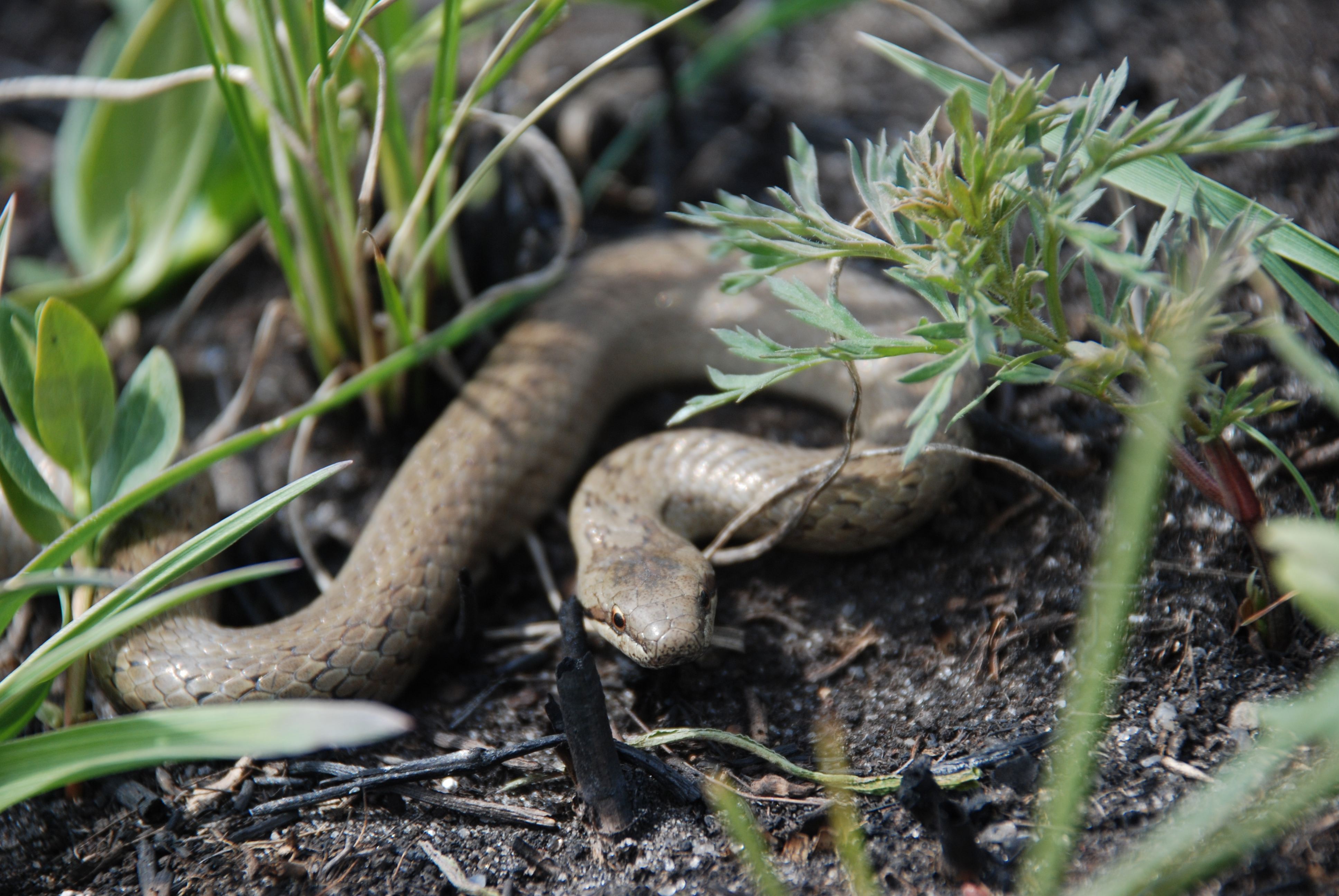 відділення «Стрільцівський степ», Міловський район с.Криничне